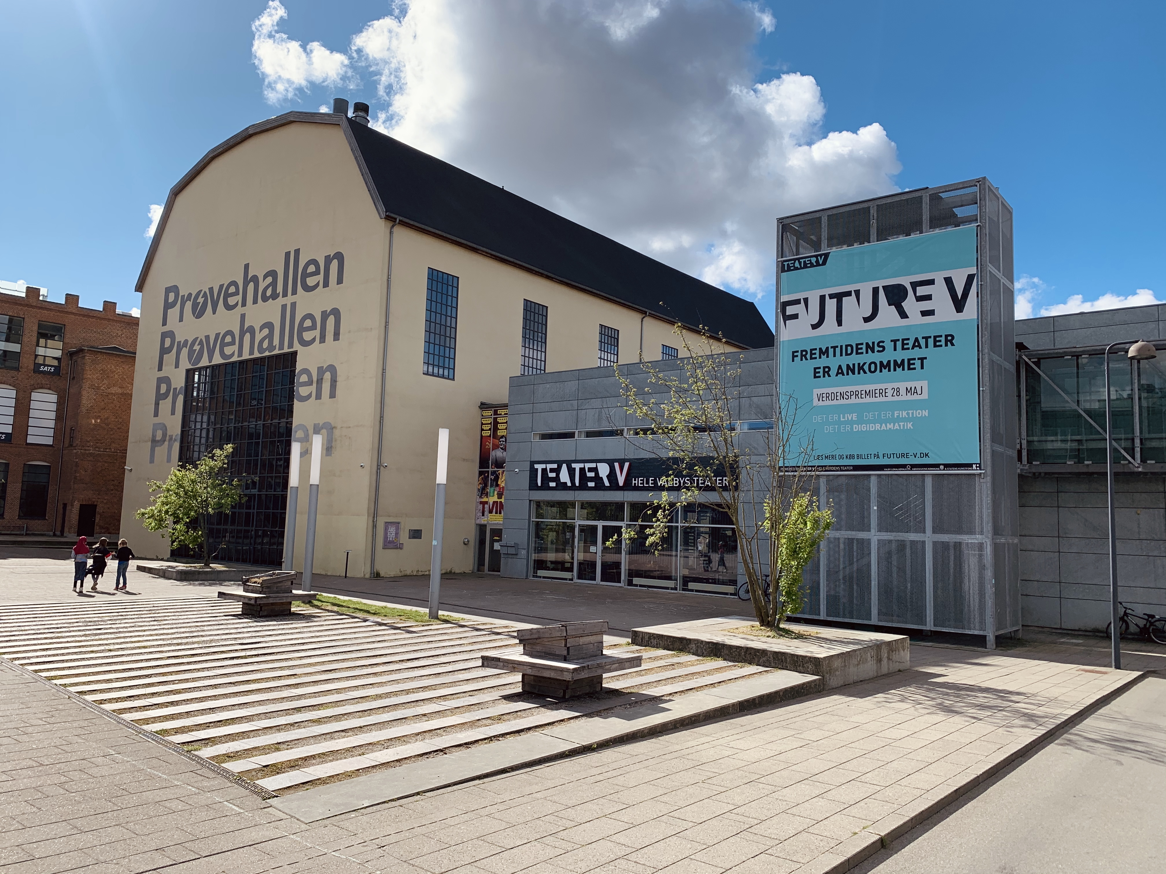 Teater V har til huse i Prøvehallen i Valby